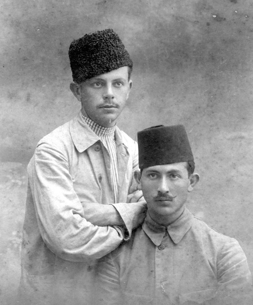 1910-1915 ,"Mordechei Yigal and Yizhak Hoz, "Hashomer